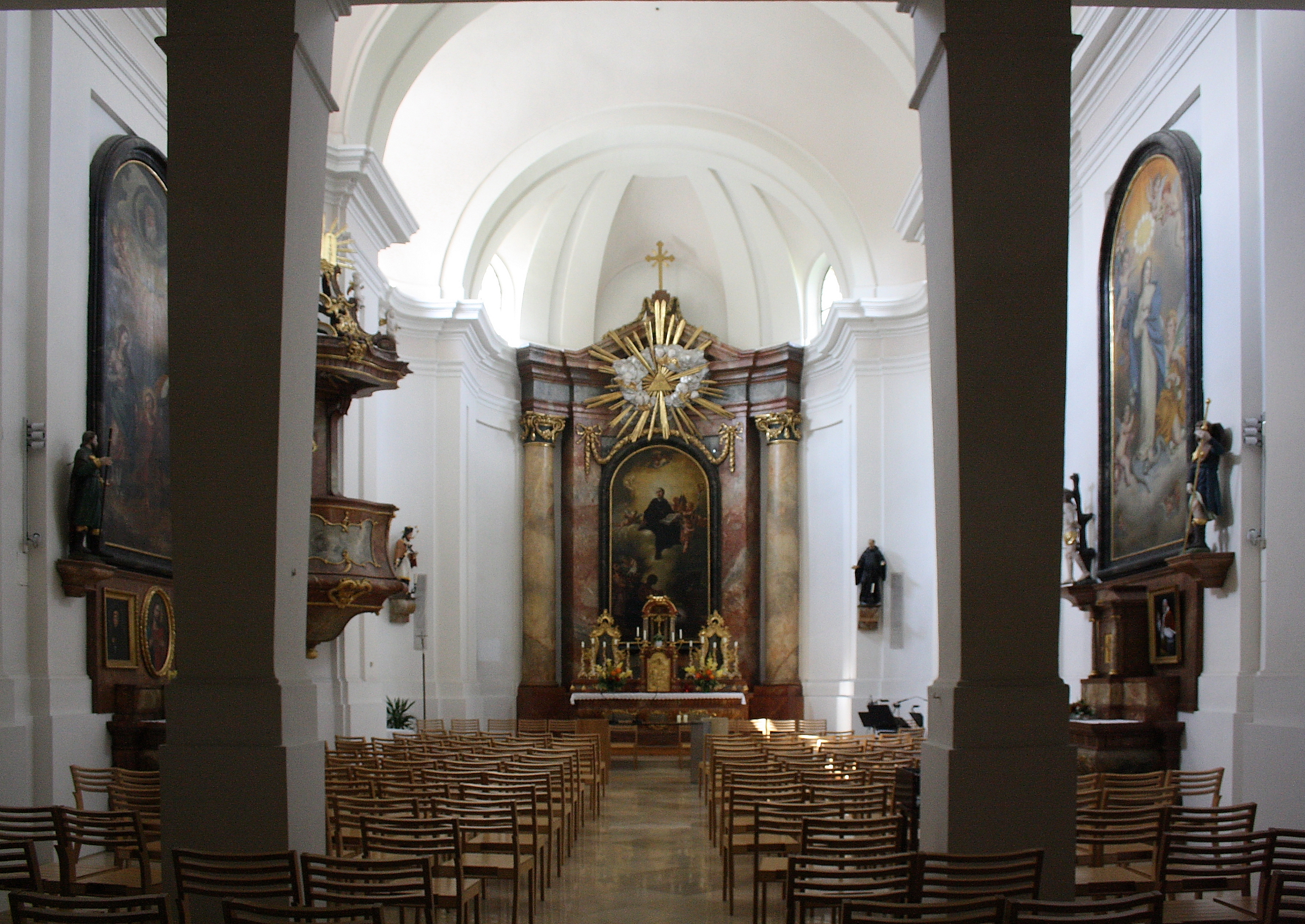 Innenansicht der Pfarrkirche von Münchendorf.